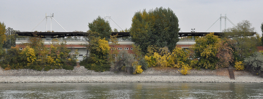 MAC Stadion, Margitszigeti Atlétikai Centrum?